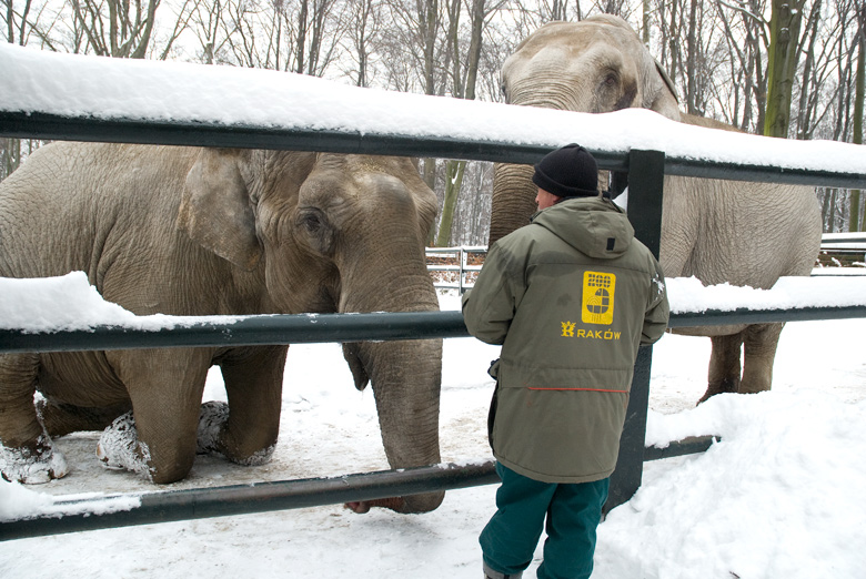 Слни Краківського зоопарку взимку